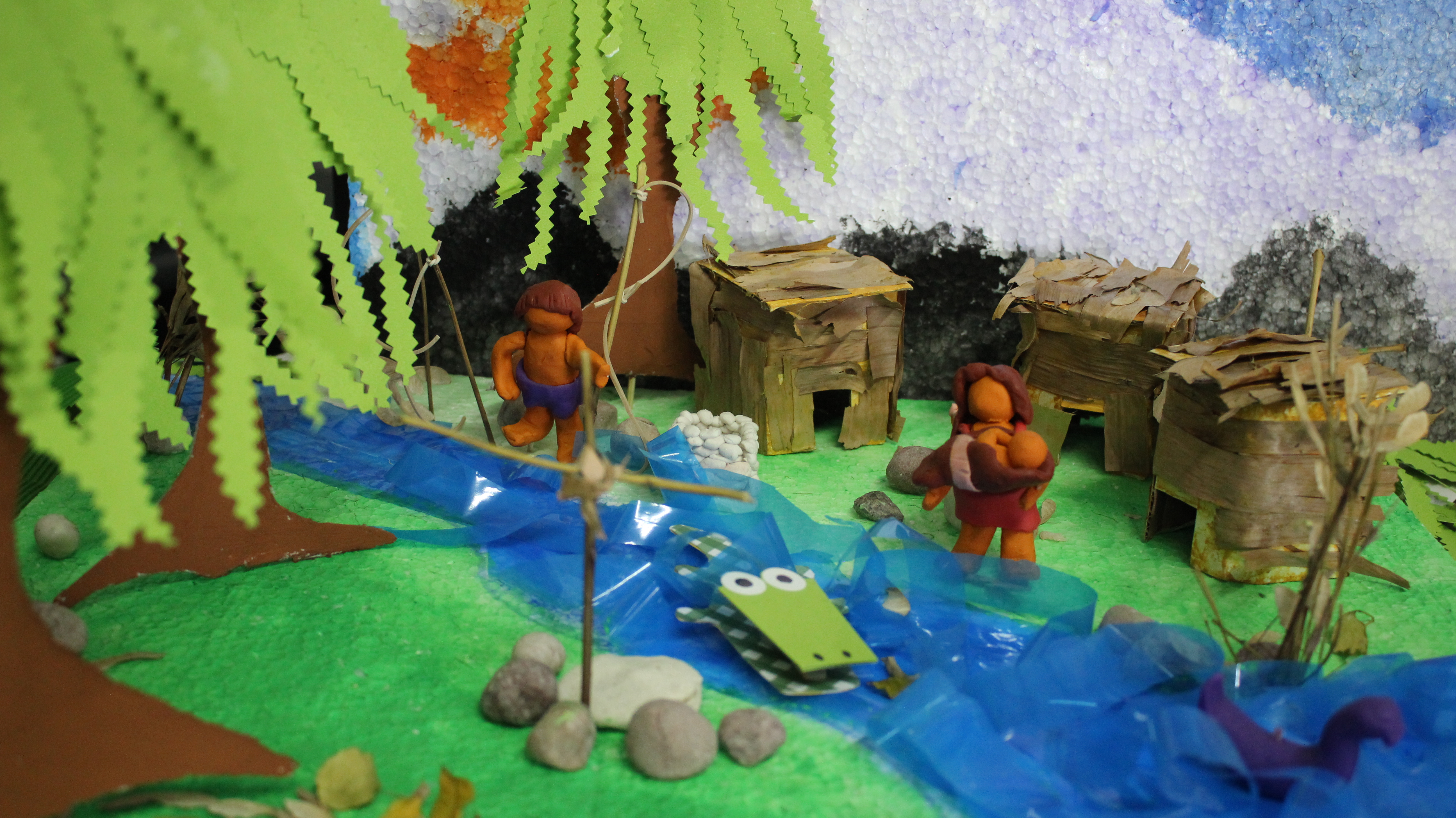 Imagen de una maqueta utilizada para realizar animación stop motion sobre una canción de cuna toba. Los tobas eran nómadas con una economía basada en a caza y la pesca y recolección. En la canción de cuna la madre le canta al niño diciéndole que el padre fue a pescar y a recolectar miel y ella necesita que el se duerma para tejer la red que su padre necesita para pescar.